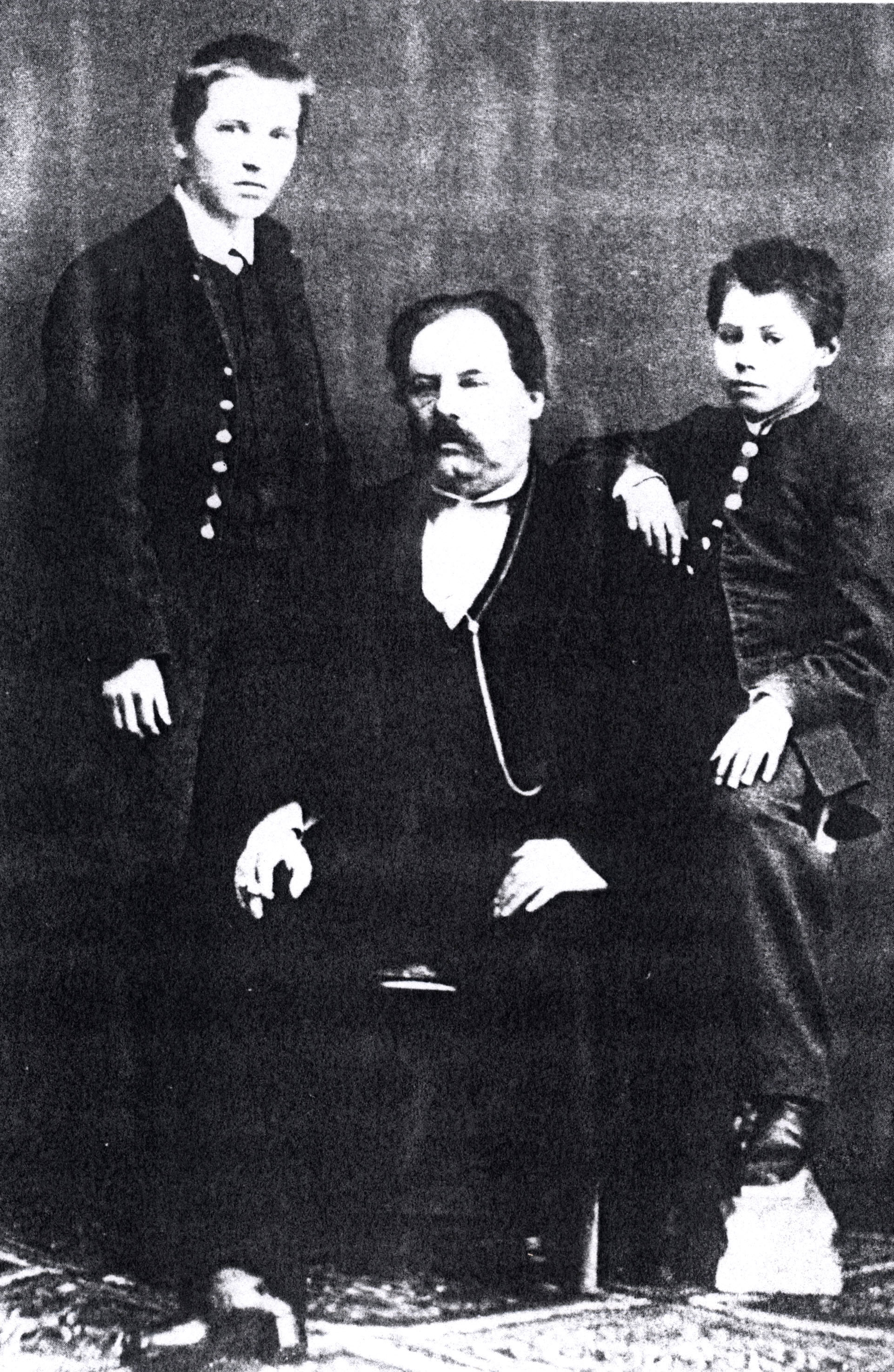 Михаил Андреевич Крутовский с сыновьями Владимиром и Всеволодом.